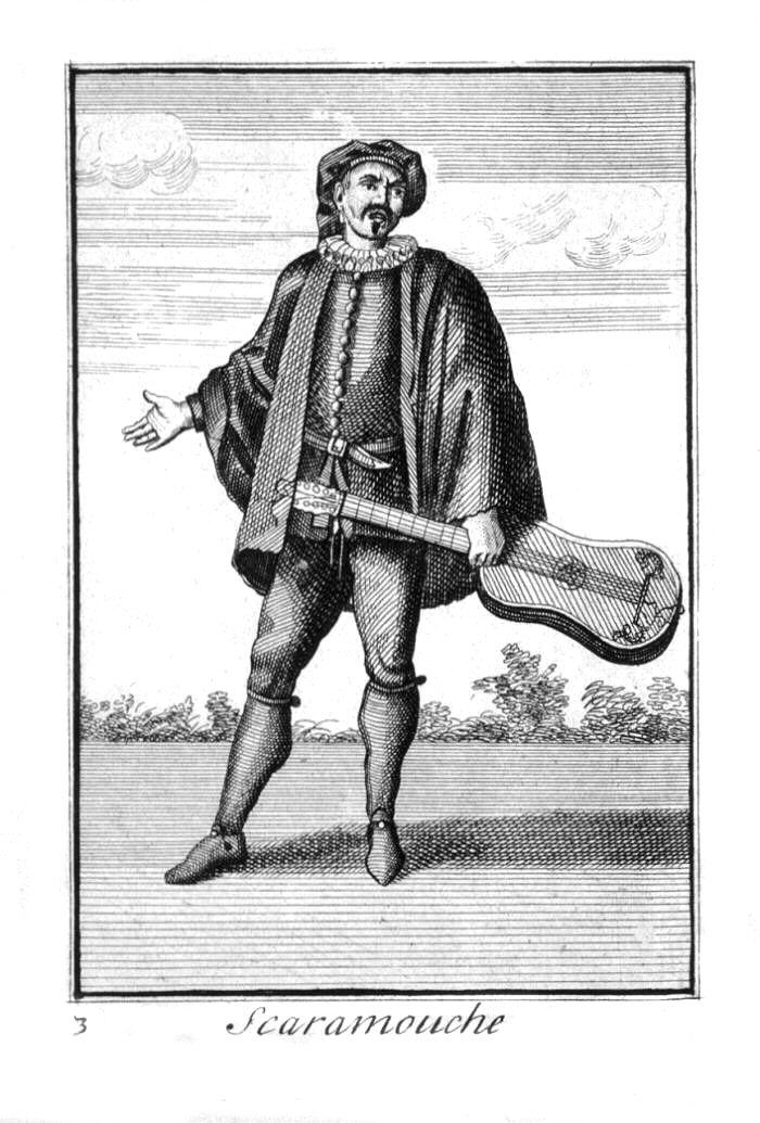 Scaramouche